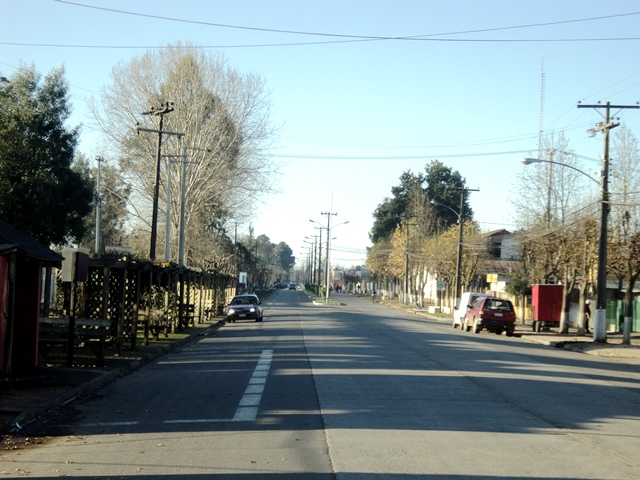 Avenida Errázuriz, calle principal de la ciudad de Retiro (Chile)